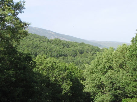 Forest in La Acebeda (Madrid)